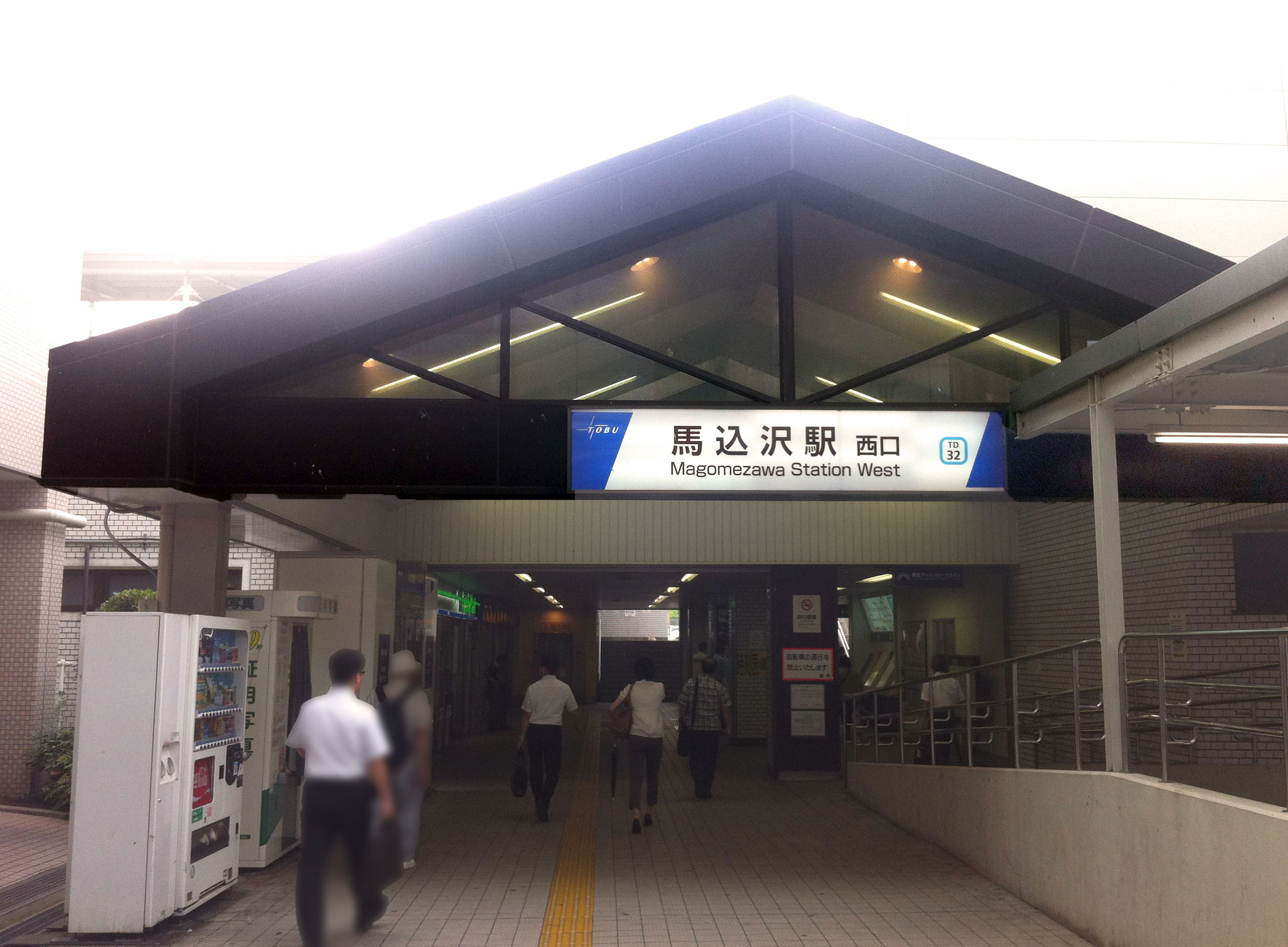 馬込沢駅の西口 Magomezawa, west exit